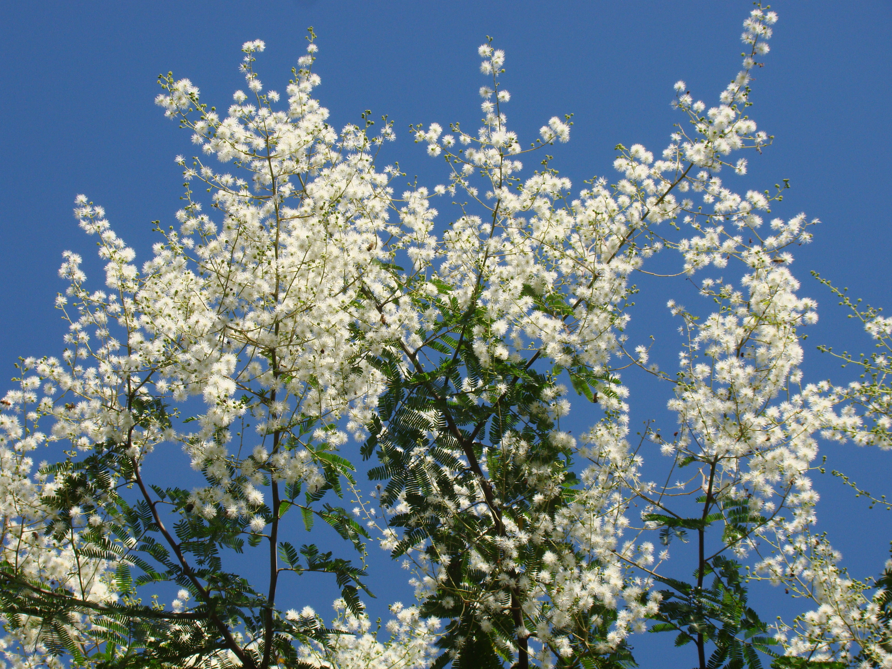 ceret Park, Sao Paulo